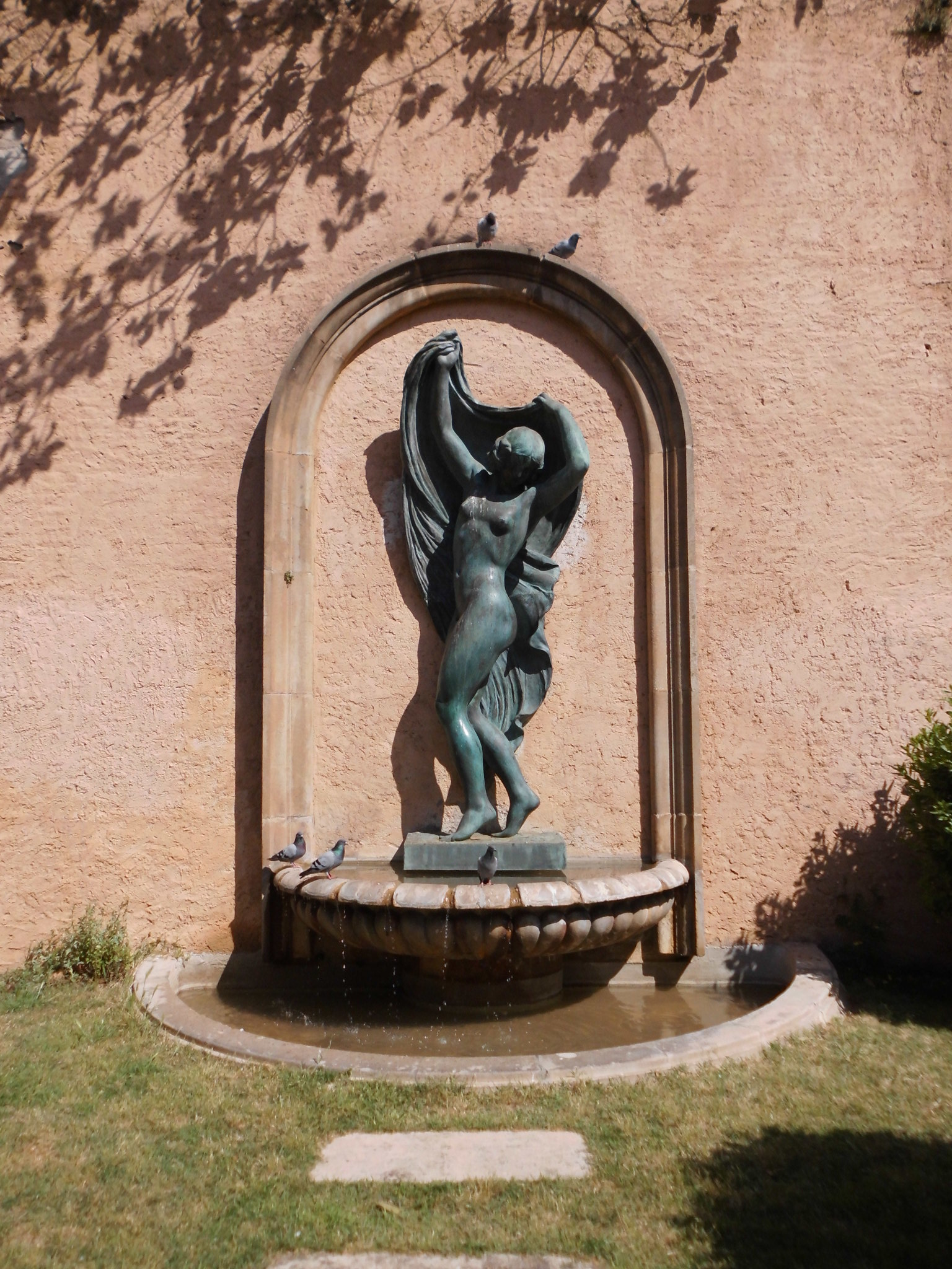 Marinada (Antoni Alsina). Pg. de Santa Madrona, Museu Arqueològic (Barcelona)